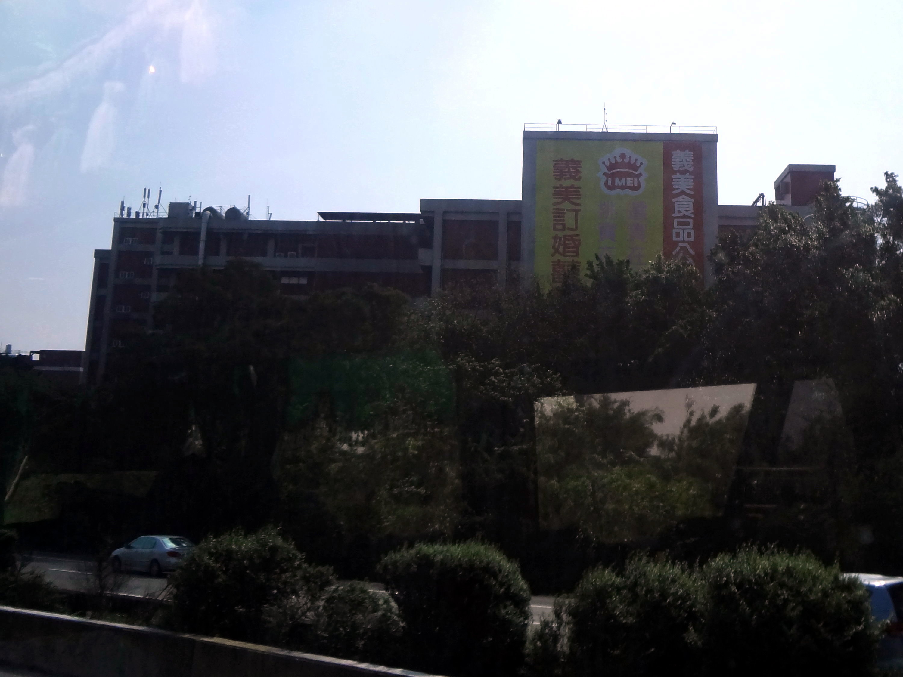 義美食品龍潭廠，位於臺灣桃園市龍潭區中興路九龍段129巷91號。本照片係於高速公路遊覽車上拍攝，外牆布幔的紅底白字是「義美食品公司龍潭廠」九字。